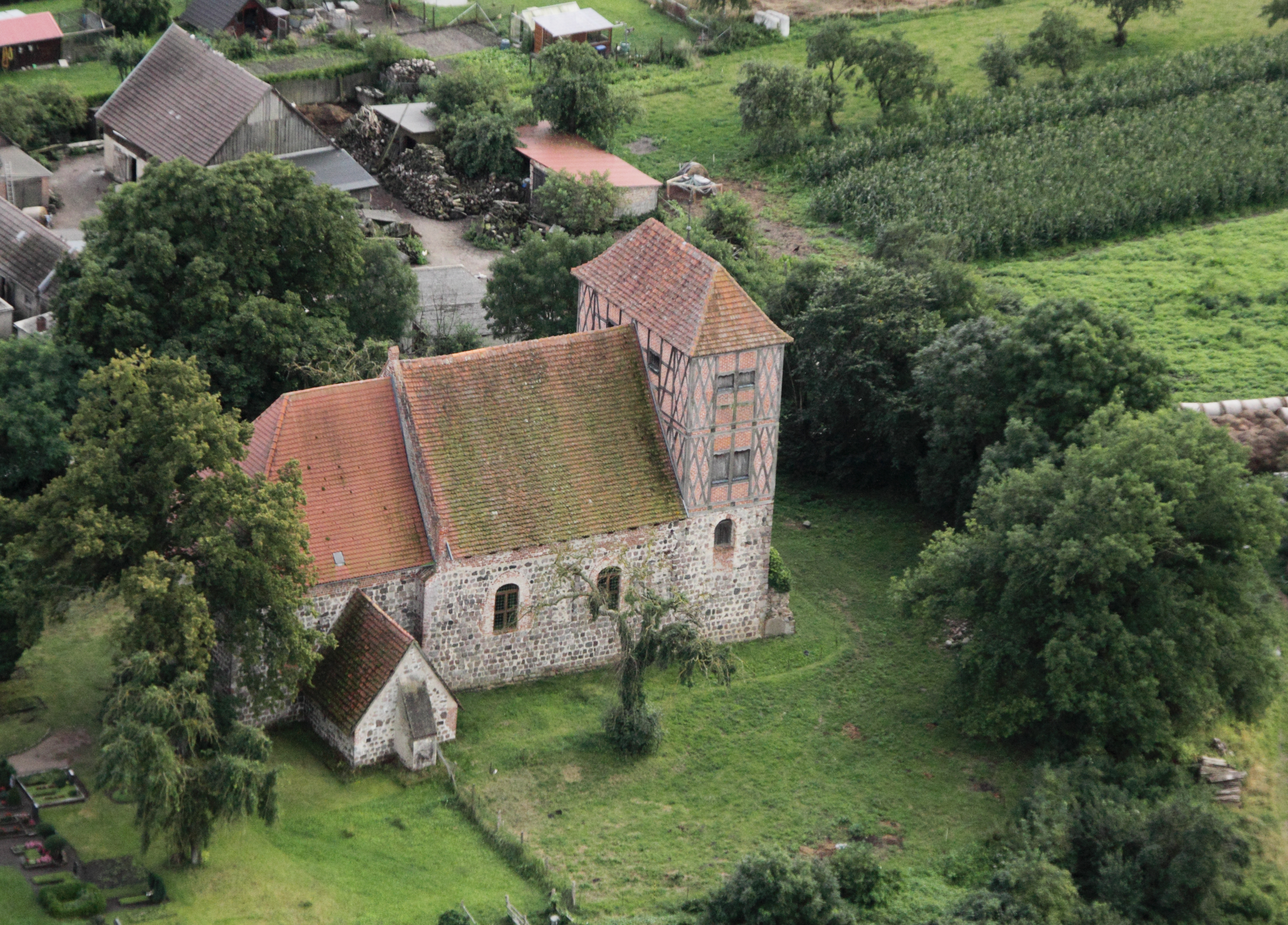 Fotoflug Waren (Müritz) und Umgebung: Dorfkirche Vielist